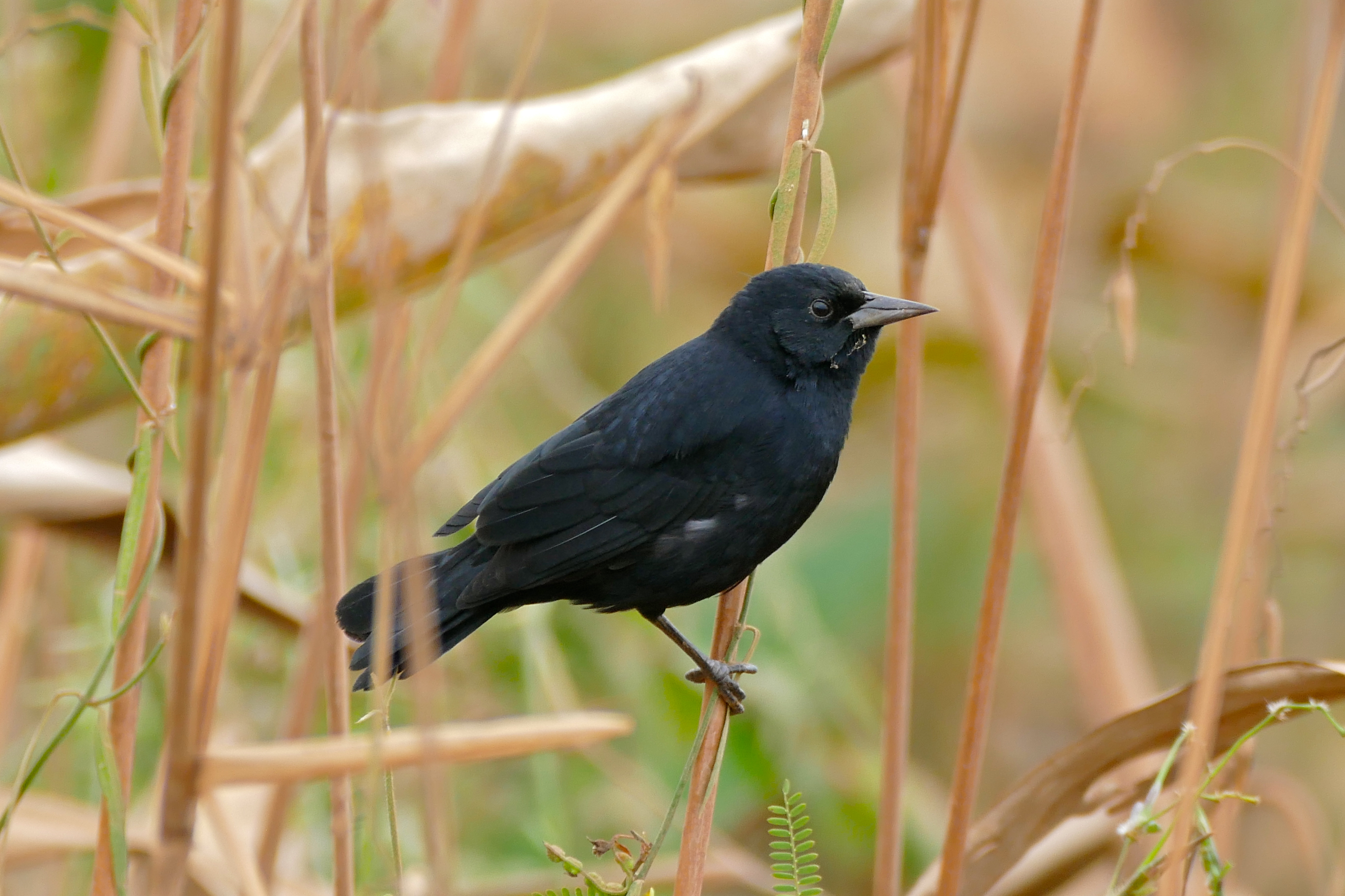 Transpantaneira, Poconé, Mato Grosso, BRAZIL